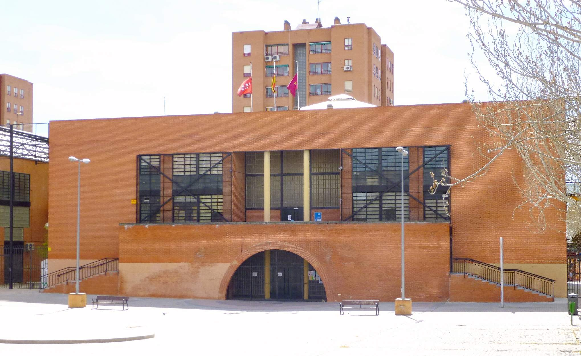 Centro Cultural El Pozo del Tio Raimundo, en Puente de Vallecas, Madrid